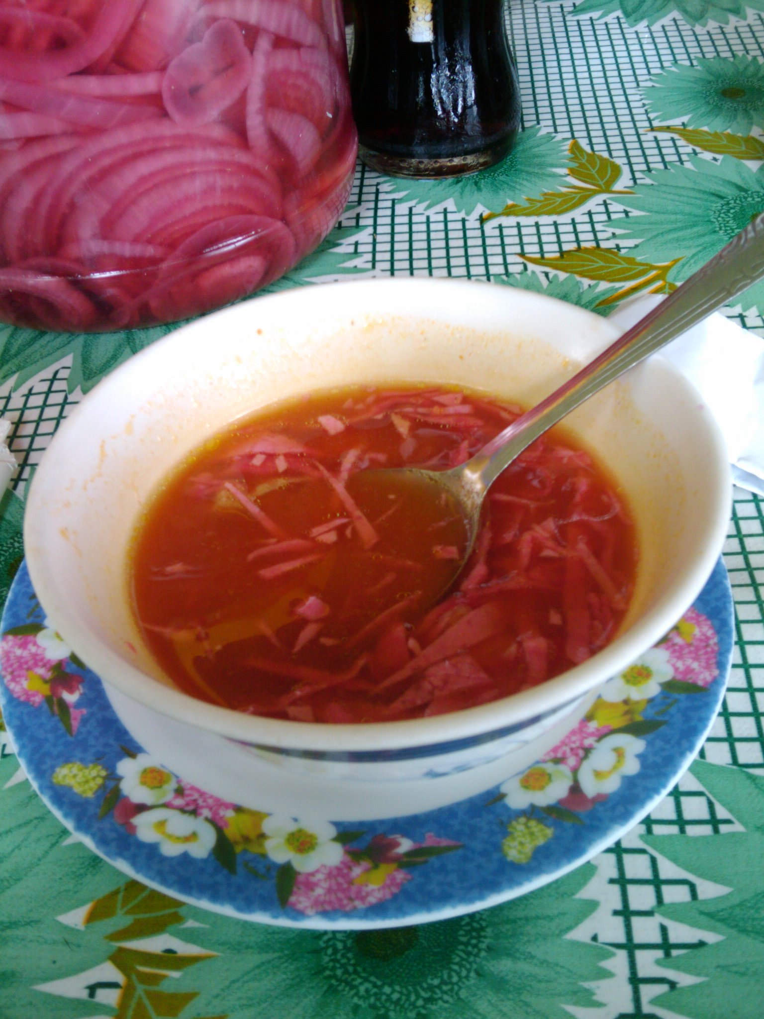 la sopa de tortillas es una entrada antes de la comida que se servirá